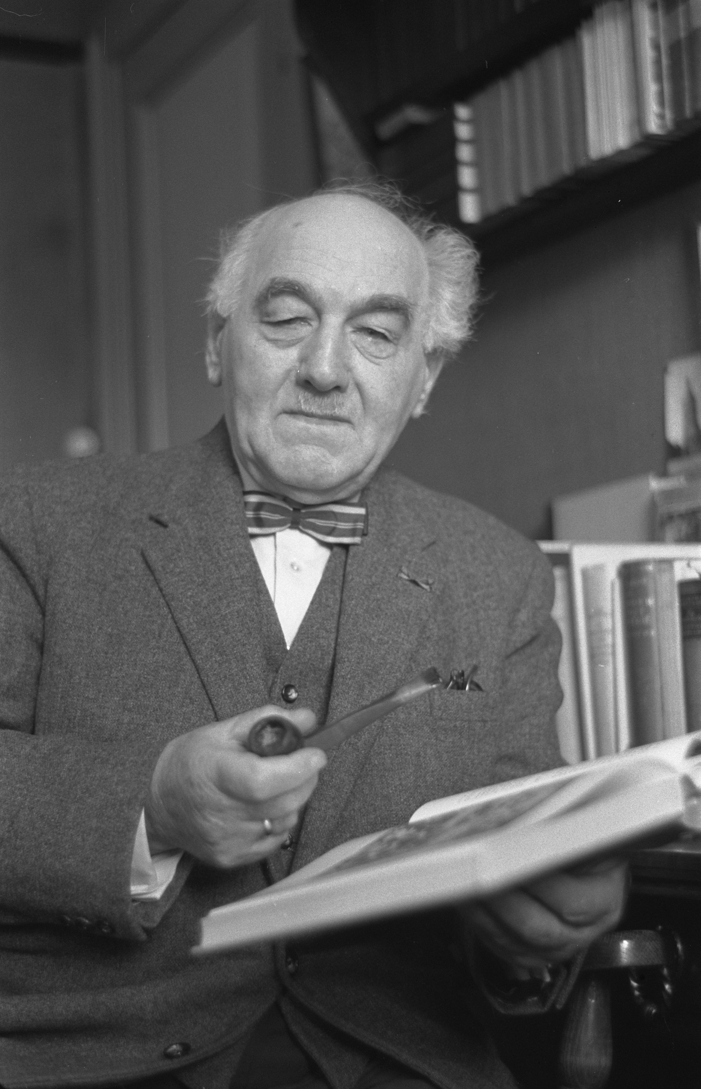 Collectie / Archief : Fotocollectie Anefo Reportage / Serie : [ onbekend ] Beschrijving : De Haarlemse toonkunstenaar Jos de Klerk hoopt 8 januari aanstaande zijn 75e verjaardag te vieren Datum : 22 december 1959 Trefwoorden : kunstenaars, verjaardagen Persoonsnaam : Klerk, Jos de Fotograaf : Pot, Harry / Anefo Auteursrechthebbende : Nationaal Archief Materiaalsoort : Negatief (zwart/wit) Nummer archiefinventaris : bekijk toegang 2.24.01.05 Bestanddeelnummer : 910-8933